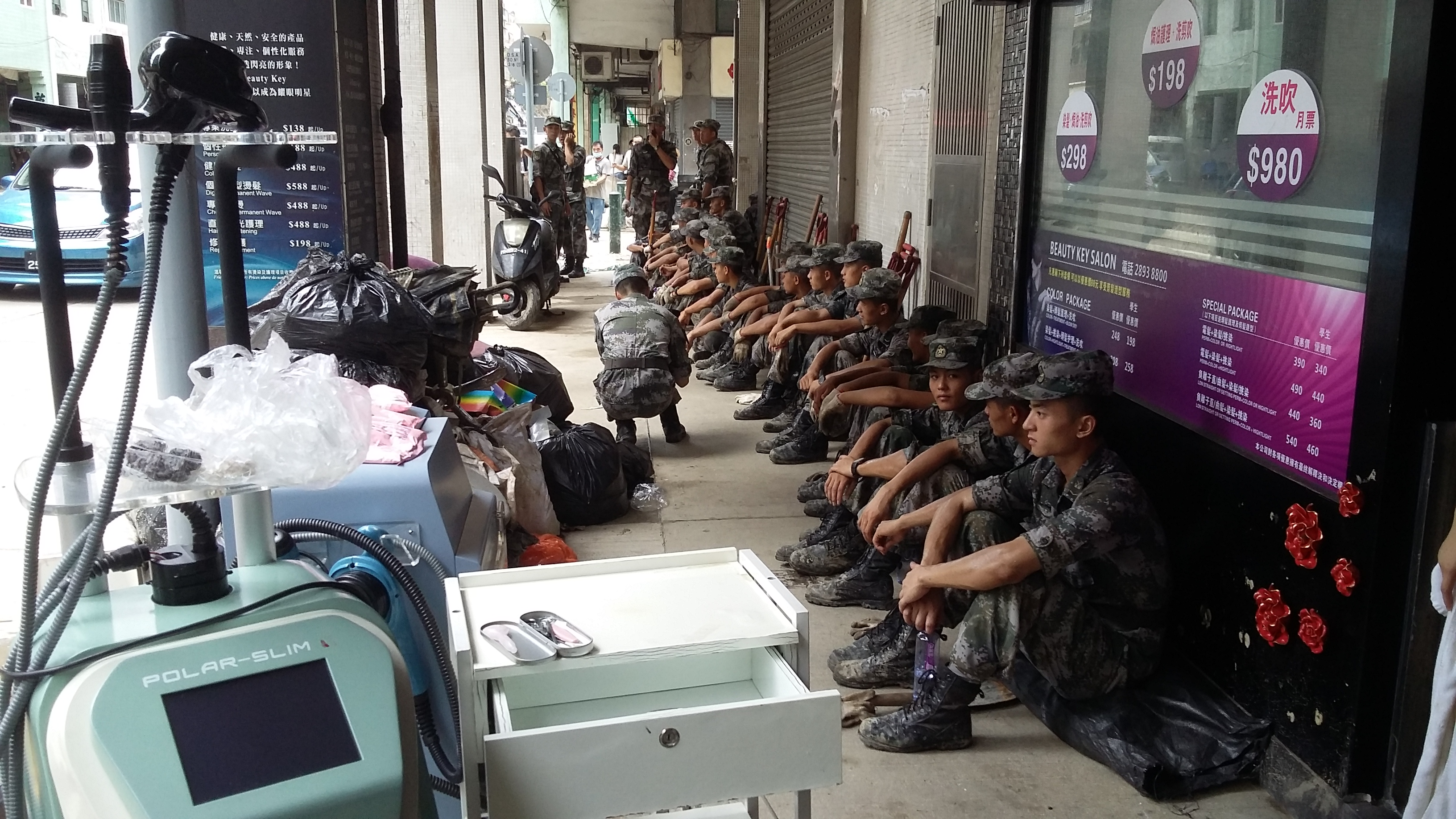 風暴過後第二日，風順堂區情況。